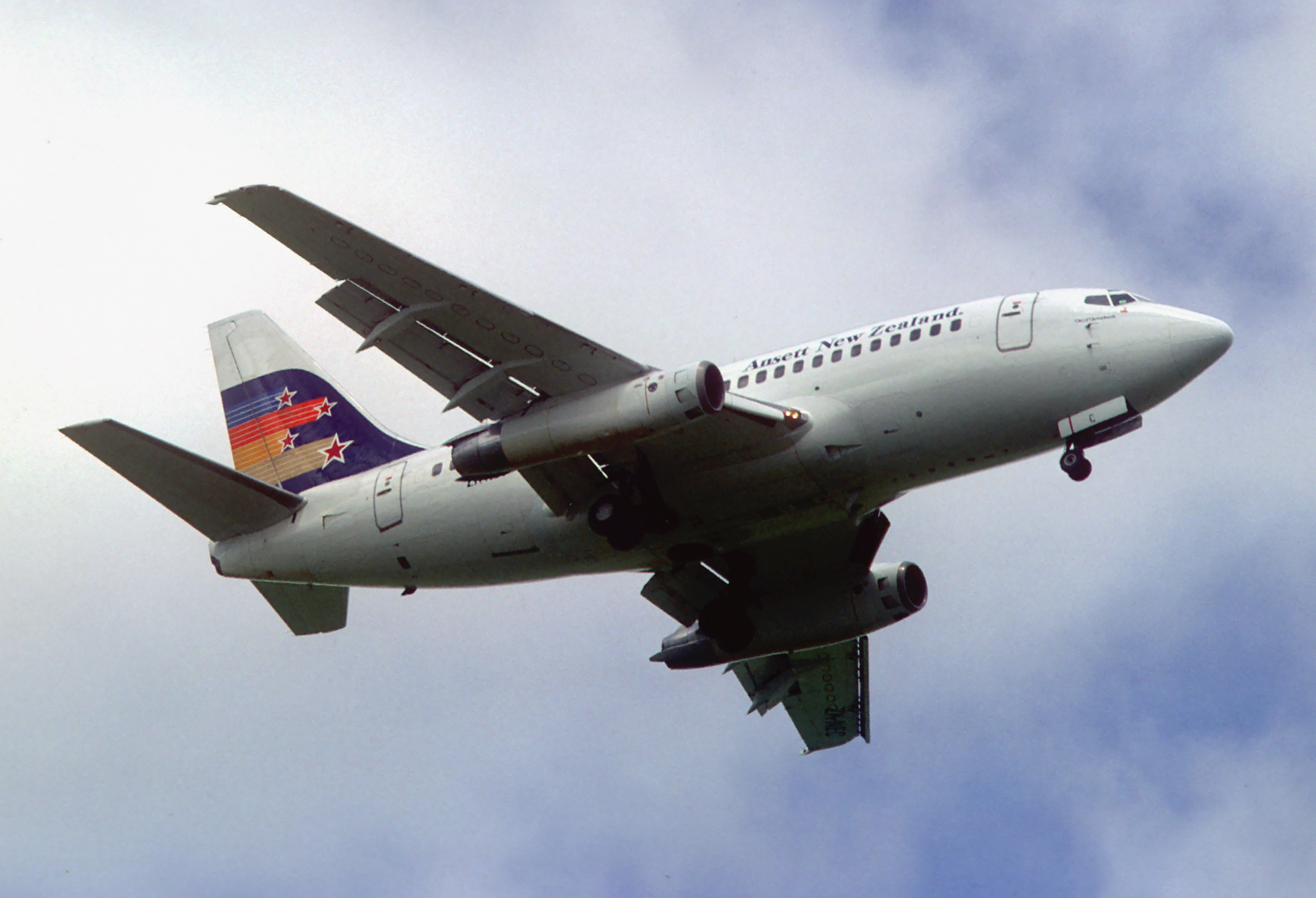 Ansett New Zealand Boeing 737-130; ZK-NEC, November 1988/ BYU